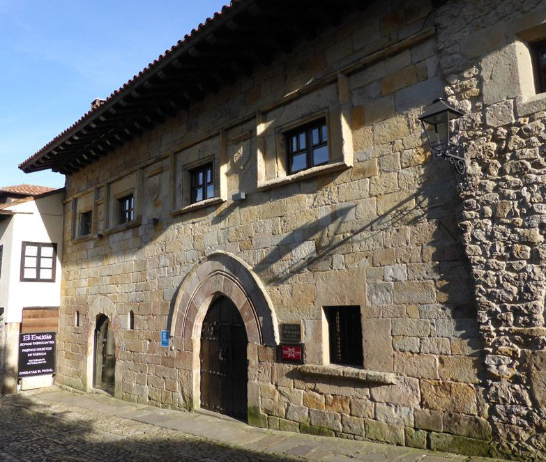 CasaPolancoLassodelaVega